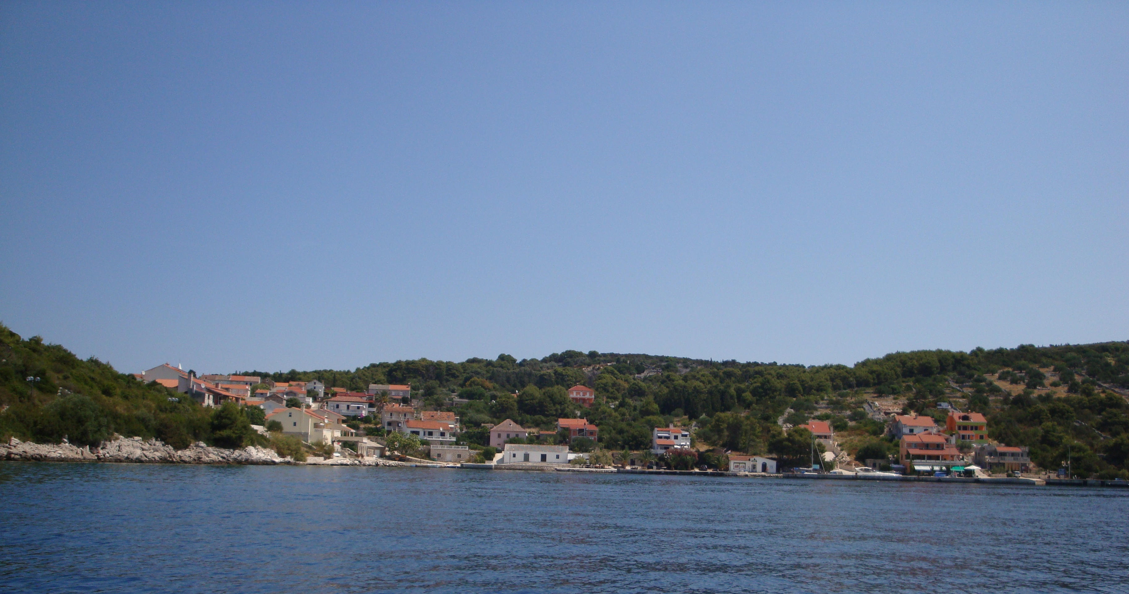 naselje Zverinac, otok Zverinac